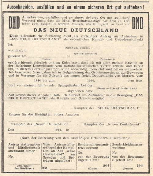 Angebliche Mitgliedskarte für die Bewegung "Das Neue Deutschland". Hergestellt von der OSS im Herbst 1944.